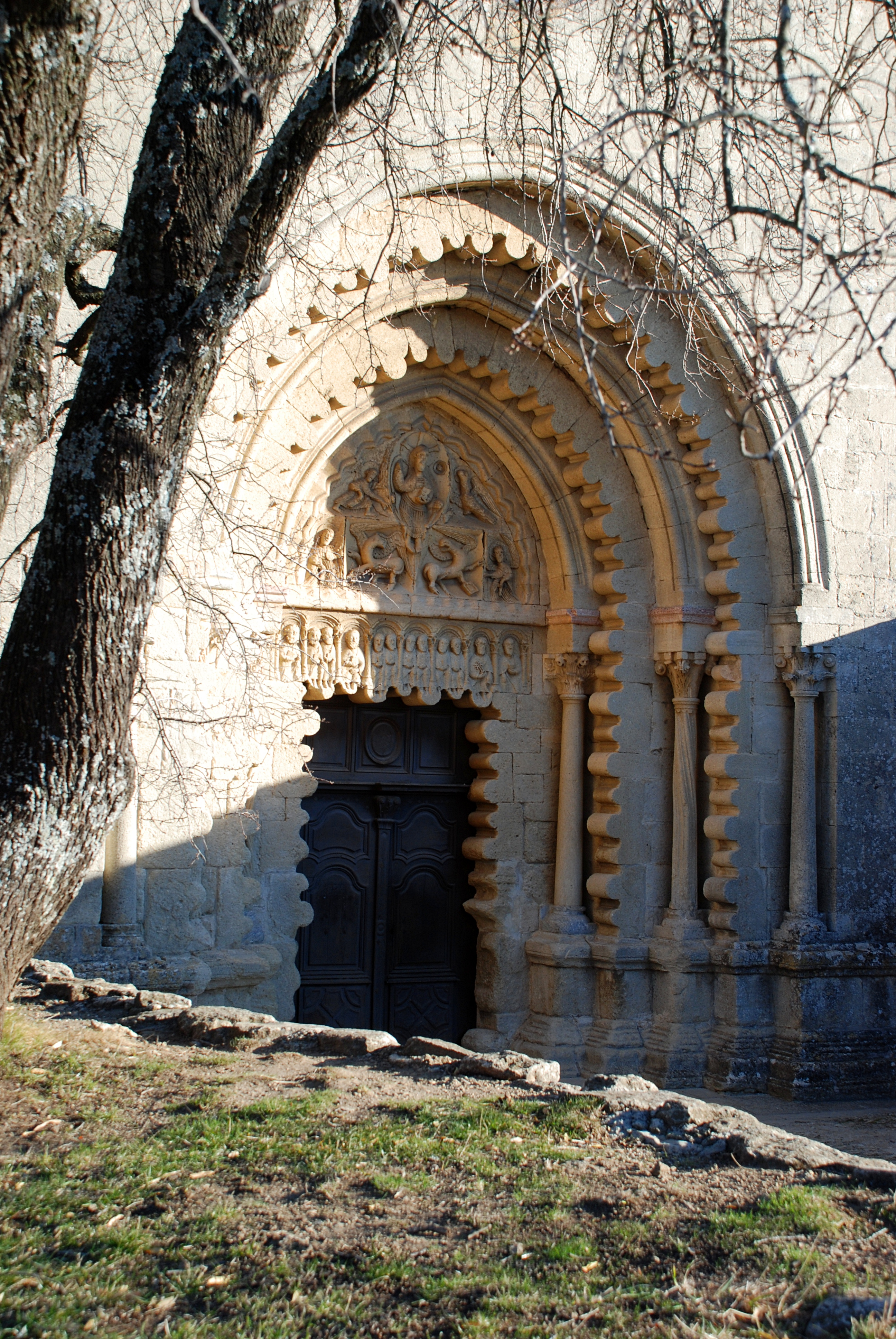 Ganagobie - portail festonné brisé